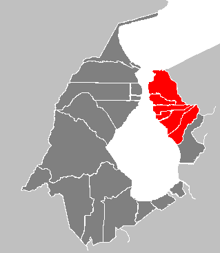 Cantón Altagracia, antigua división territorial del estado Zulia 1856 - 1904